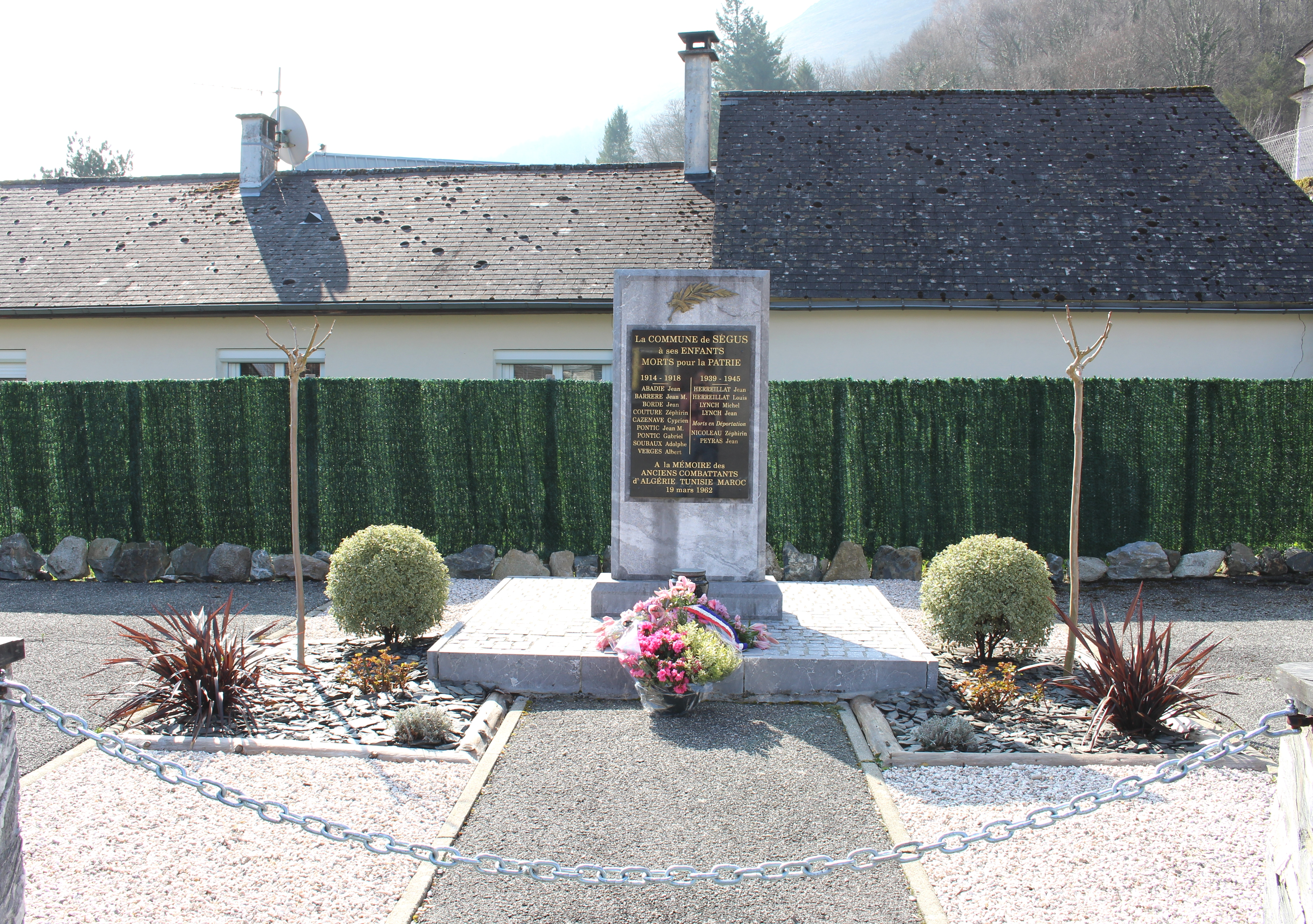 Monument aux morts de Ségus (Hautes-Pyrénées)